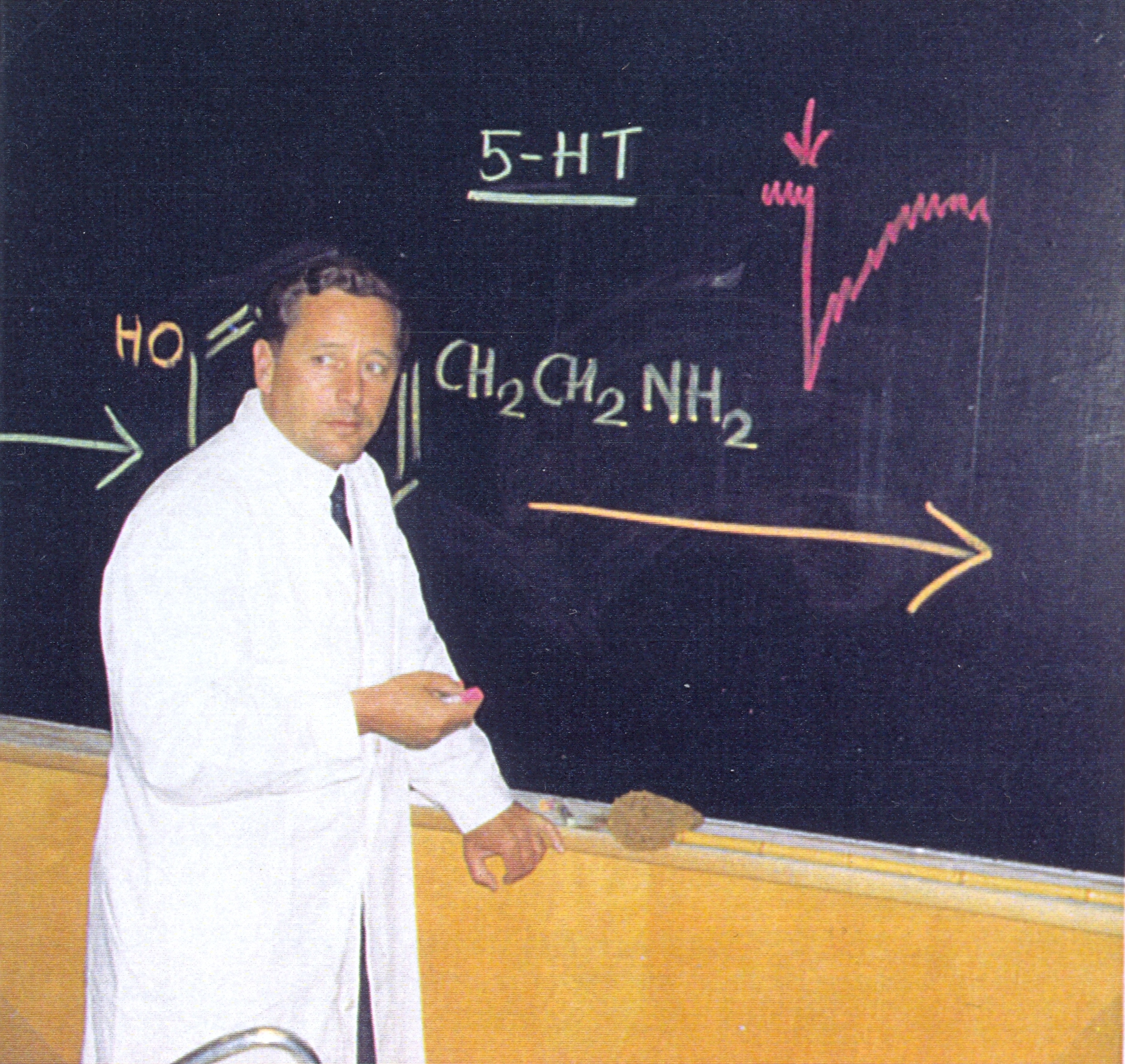 Fred Lembeck um 1970 vor Serotonin-Formel